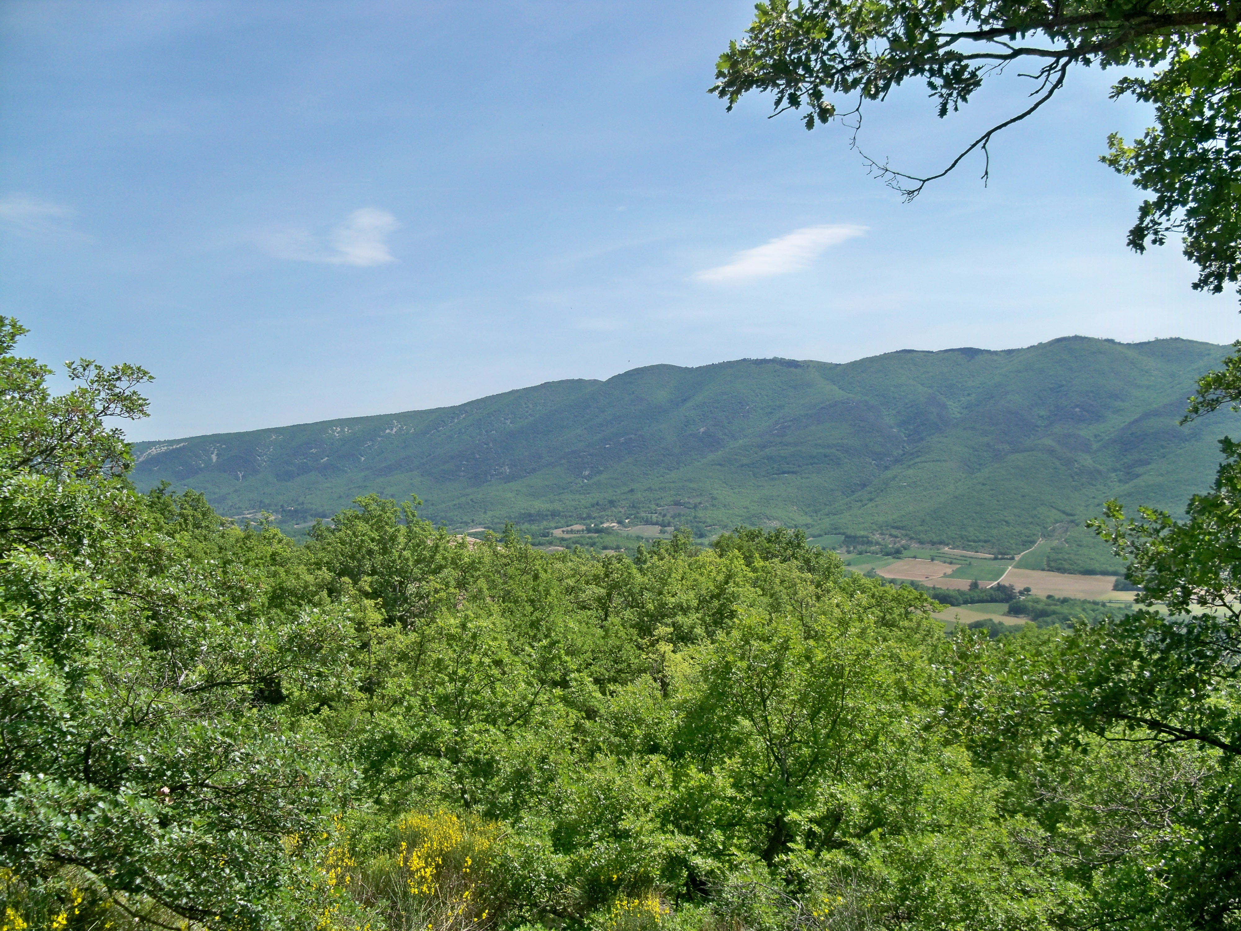 Vue sur le Luberon, depuis Saint Martin de Castillon